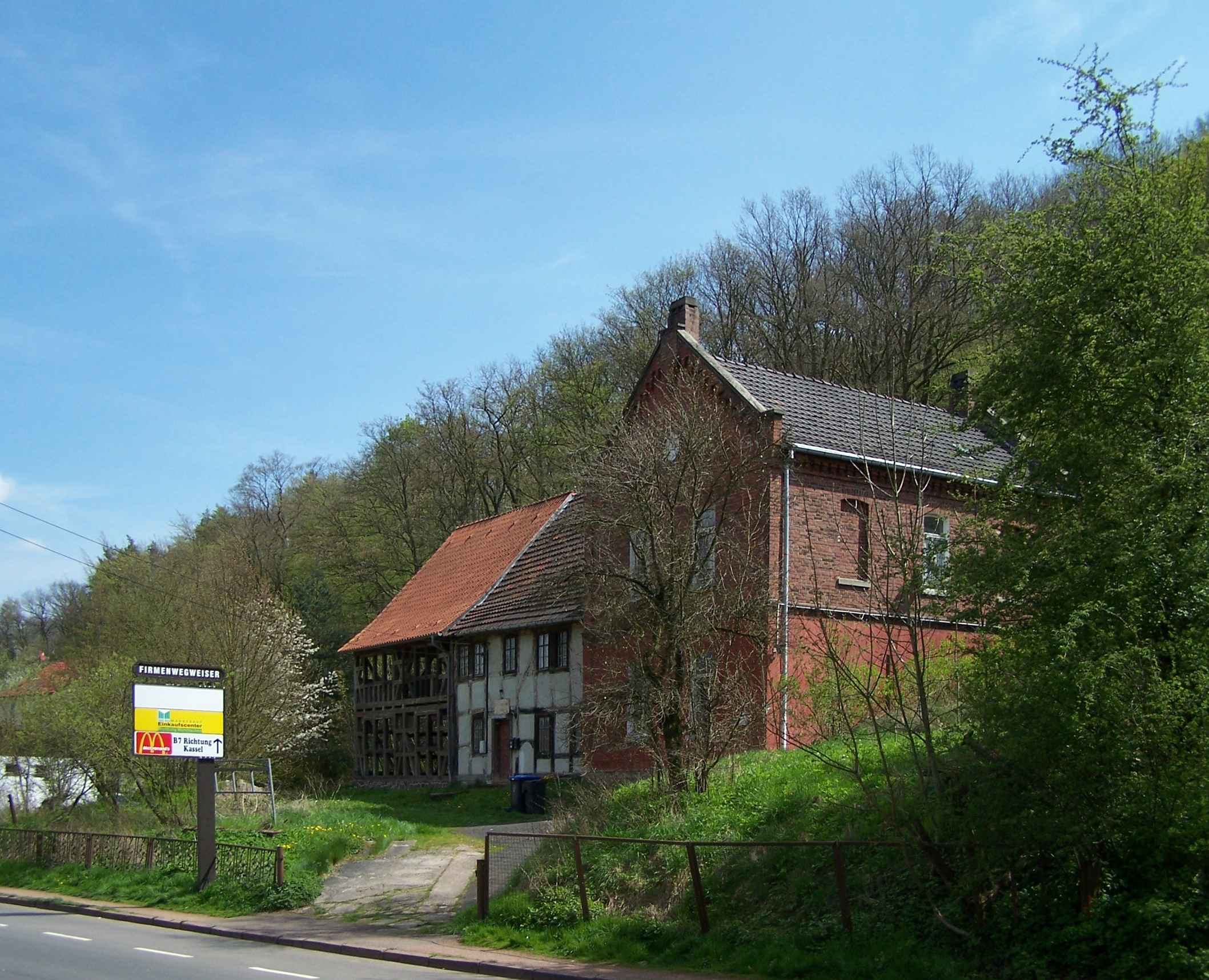 Gesamtansicht des Clemensstiftes von Westen.